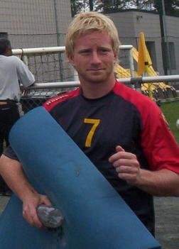 Frederik Stromstad à la fin d'une séance d'entraînement avec Le Mans UC 72, à la pincenardière.